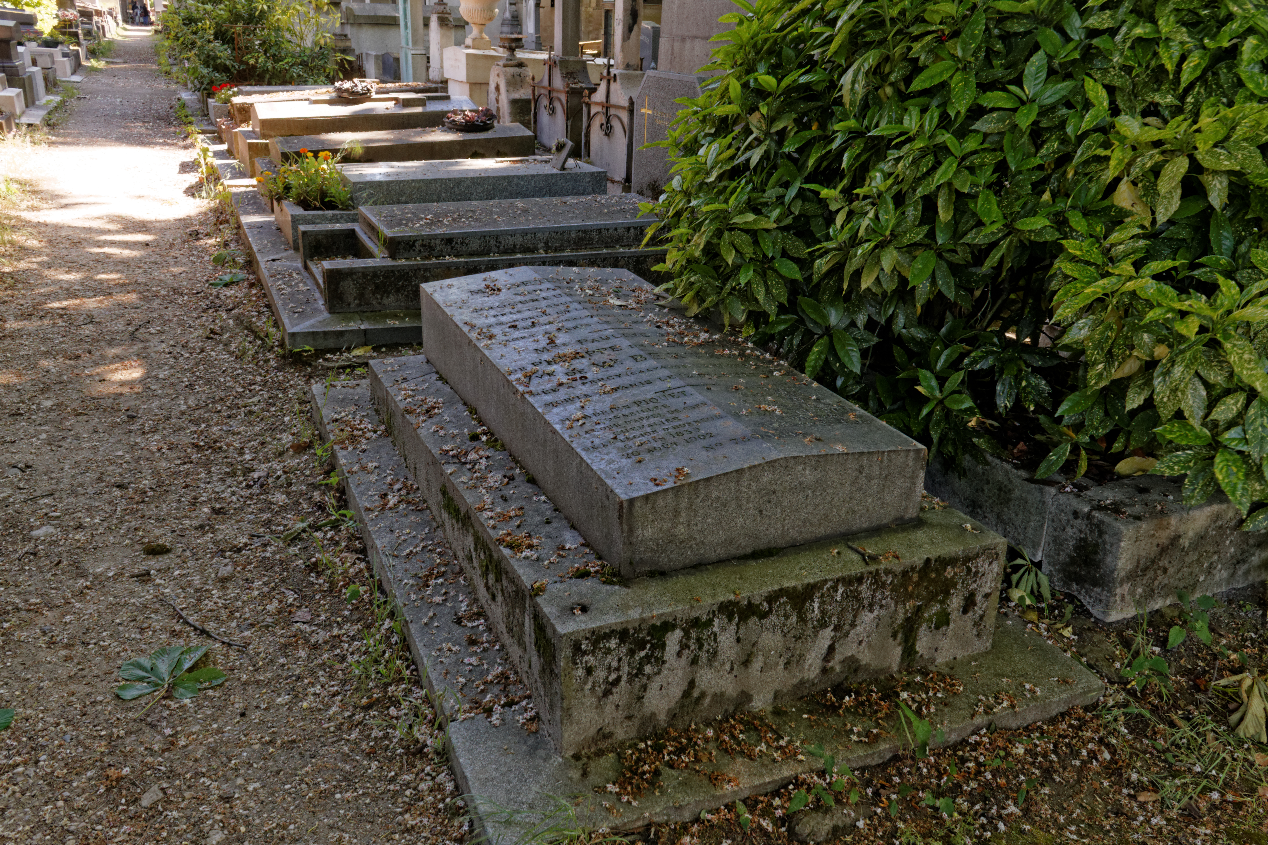 Sépulture de Charles-Alfred Bertauld (1812-1882), sénateur.